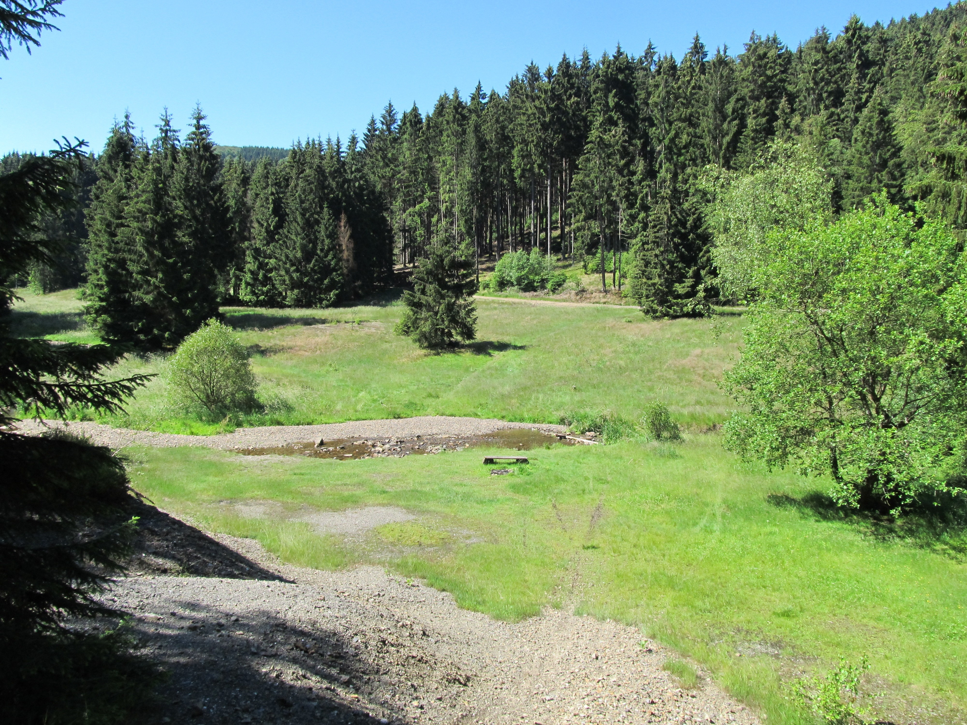 Naturschutzgebiet Unteres Buchhellertal bei Burbach, Kreis Siegen-Wittgenstein, Nordrhein-Westfalen.